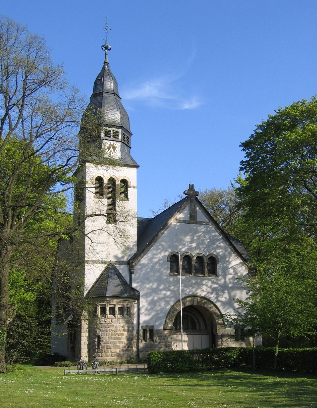 Evangelische Christuskirche (Jugendstilbau 1904/1905), Unna-Königsborn.